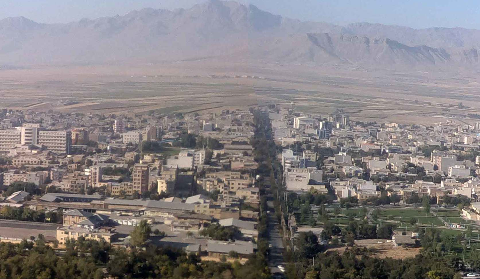 نمای سرتا سری شهرکرد